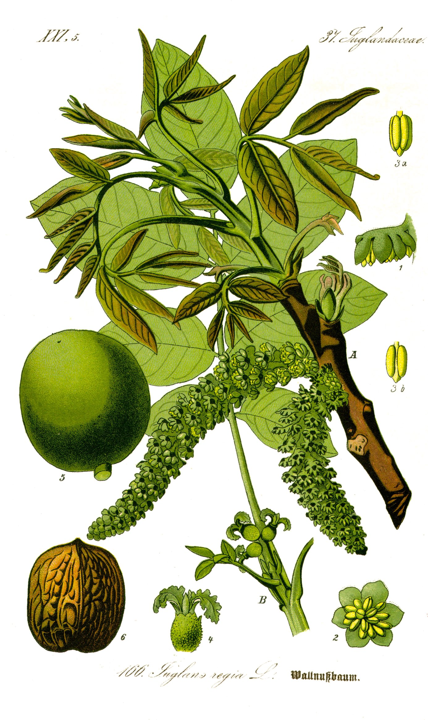 Juglans regia